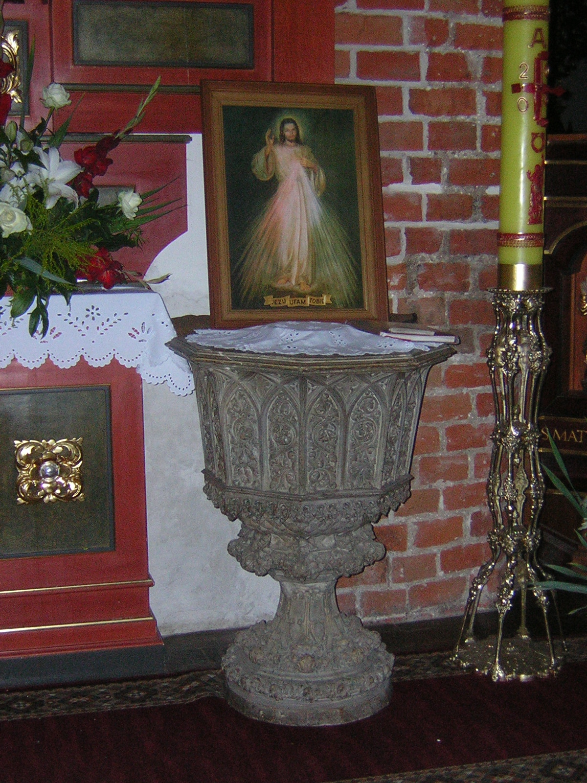 Neogotycka chrzcielnica z XIX wieku, kielichowa, wykonana ze sztucznego kamienia o bogatej dekoracji maswerkowo – roślinnej w Kościele Przemienienia Pańskiego w Iławie.